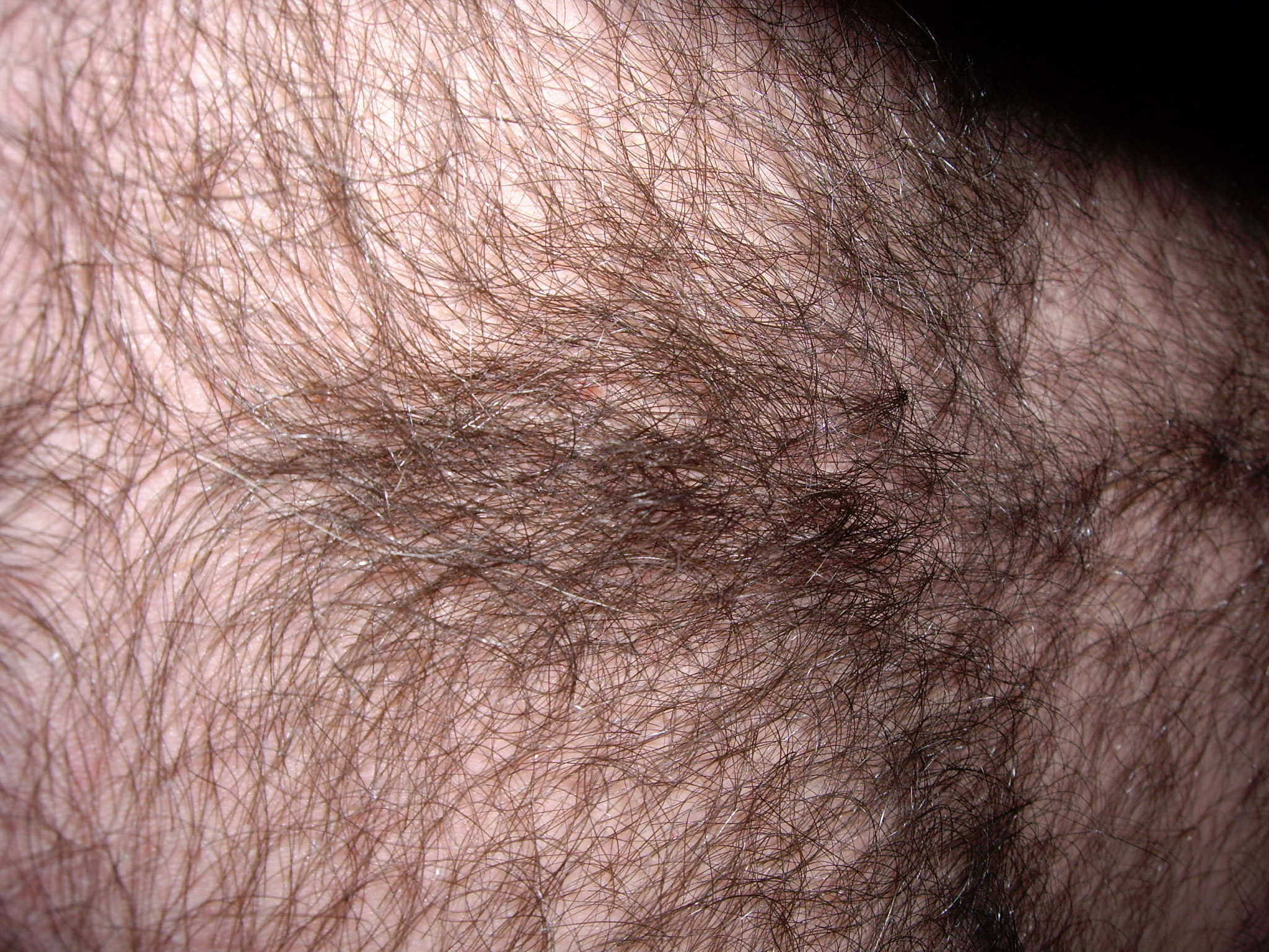 Starke Brustbehaarung beim Mann